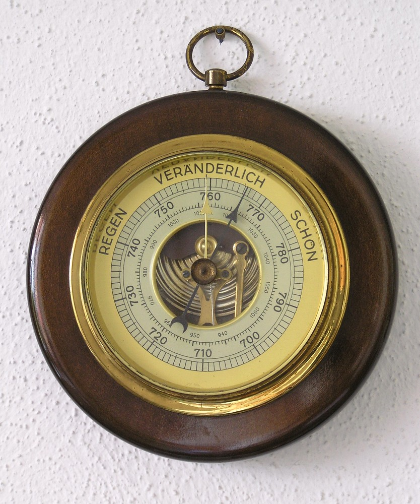 Aneroid-Barometer für den Hausgebrauch. Hinter der Skalenscheibe sind die geriffelte Oberseite der Druckdose und das Hebelwerk für die Übertragung der Bewegung auf den Zeiger zu erkennen. Baujahr etwa 1925